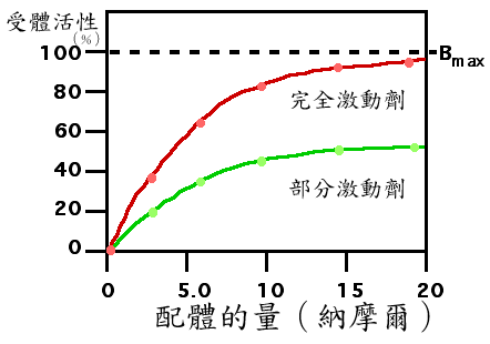 激動劑效果的曲線圖